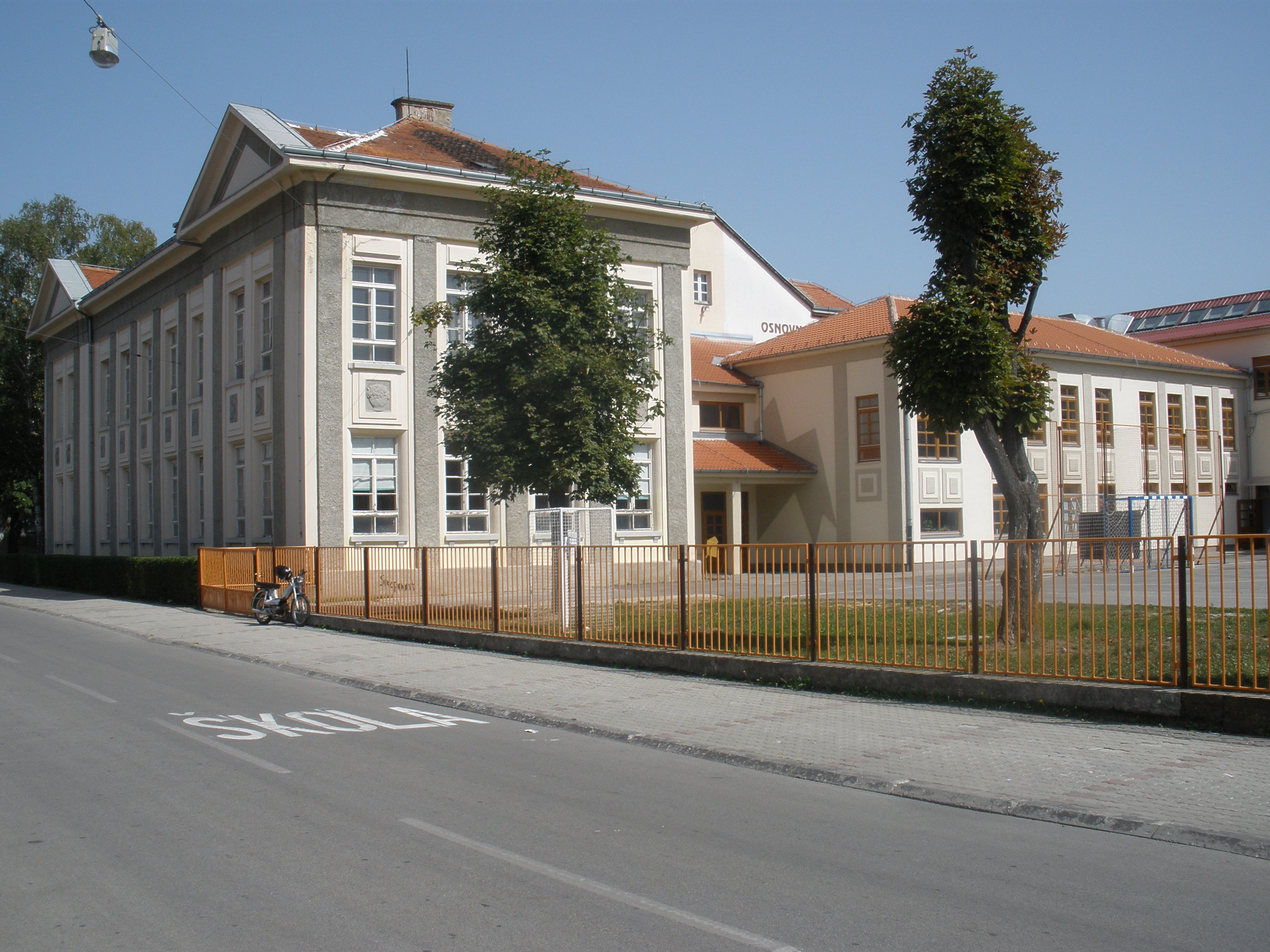 Osnovna škola Ivan Goran Kovačić u Slavonskome Brodu.